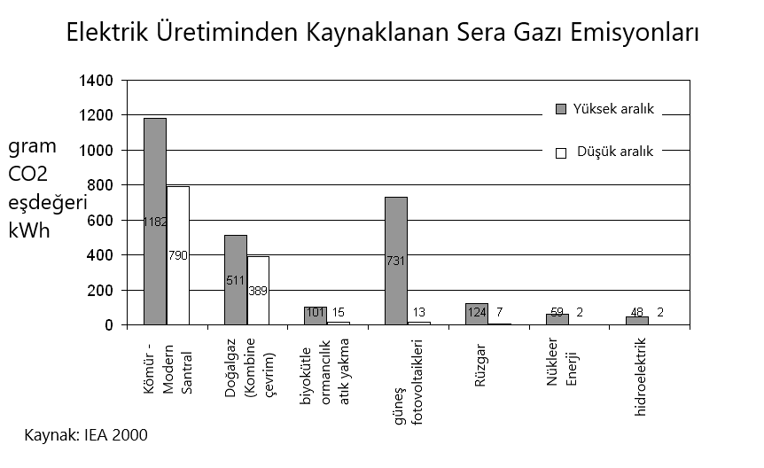 Veriler "Hidroelektrik İçsel Maliyetler ve Dışsal Yararlar"; Frans H. Koch; Uluslararası Enerji Ajansı (IEA) - Hidroelektrik Teknolojileri ve Programları için Uygulama Anlaşması; Ottawa, Kanada, 2000